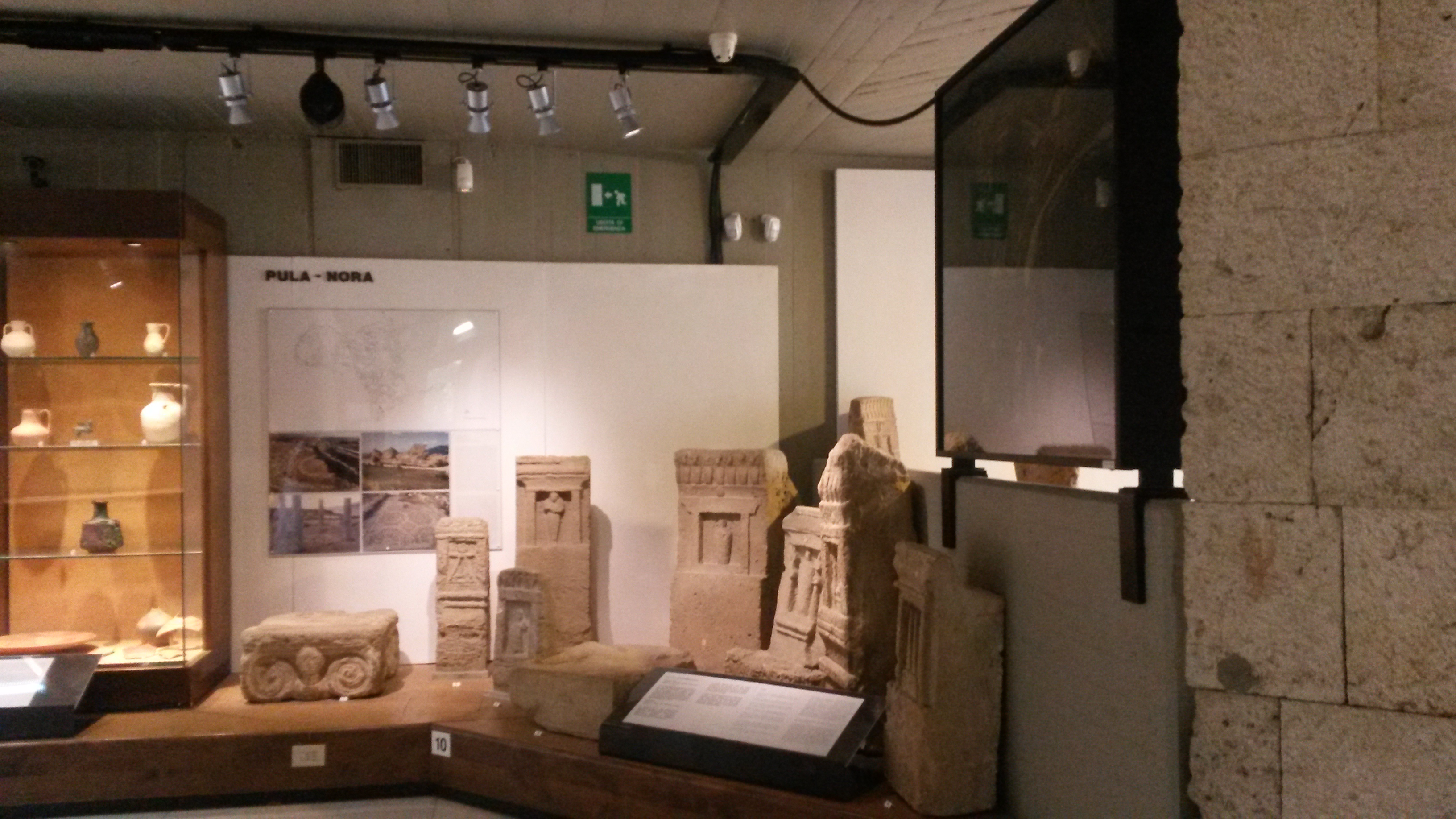 Museo Archeologico Nazionale This is a photo of a monument which is part of cultural heritage of Italy.